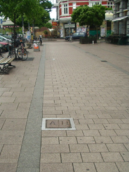 Ehemaliger Grenzverlauf Hamburg/Altona am Schulterblattplatz im Schanzenviertel.